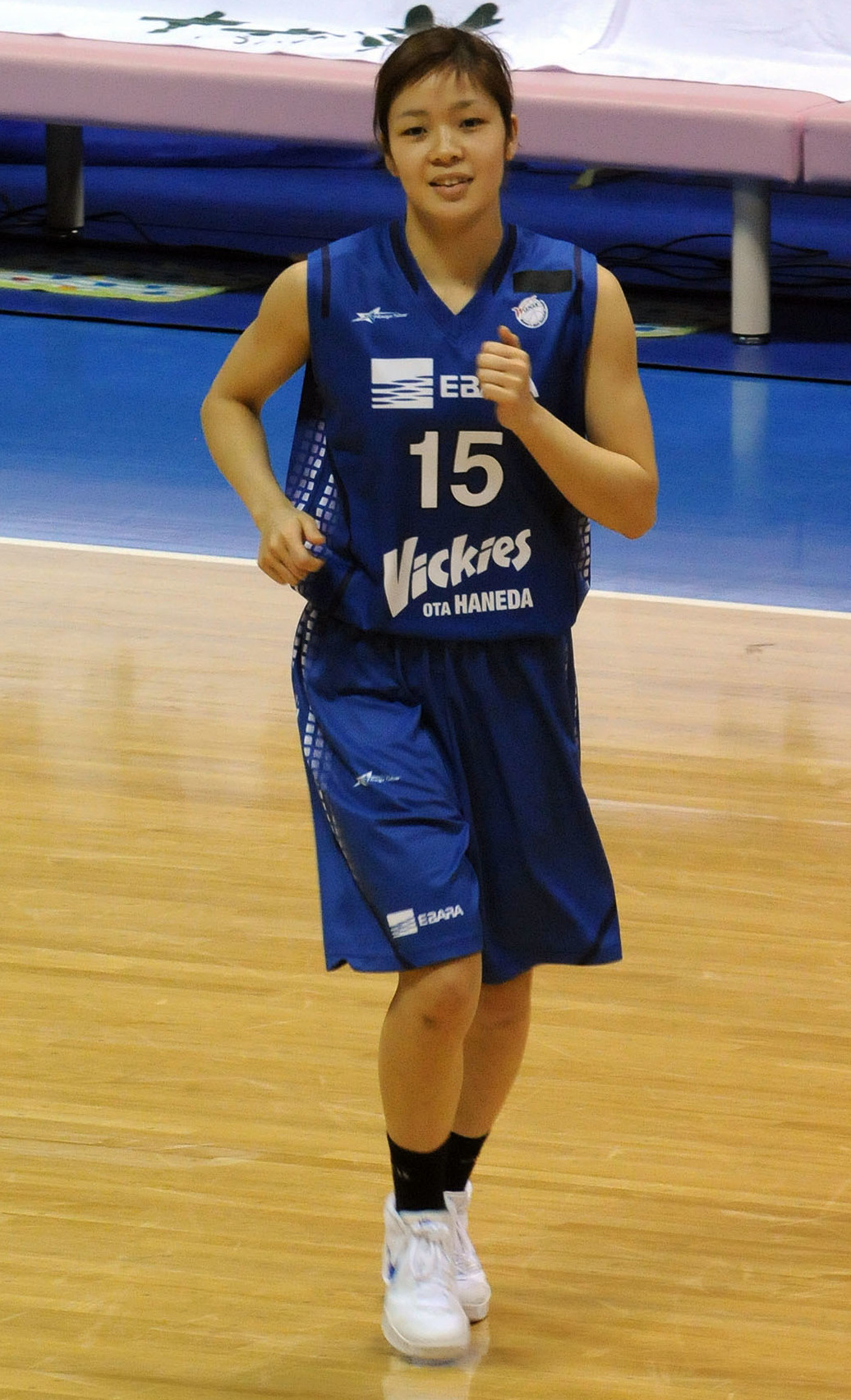 羽田ヴィッキーズ、落合里泉選手。代々木第二体育館で。